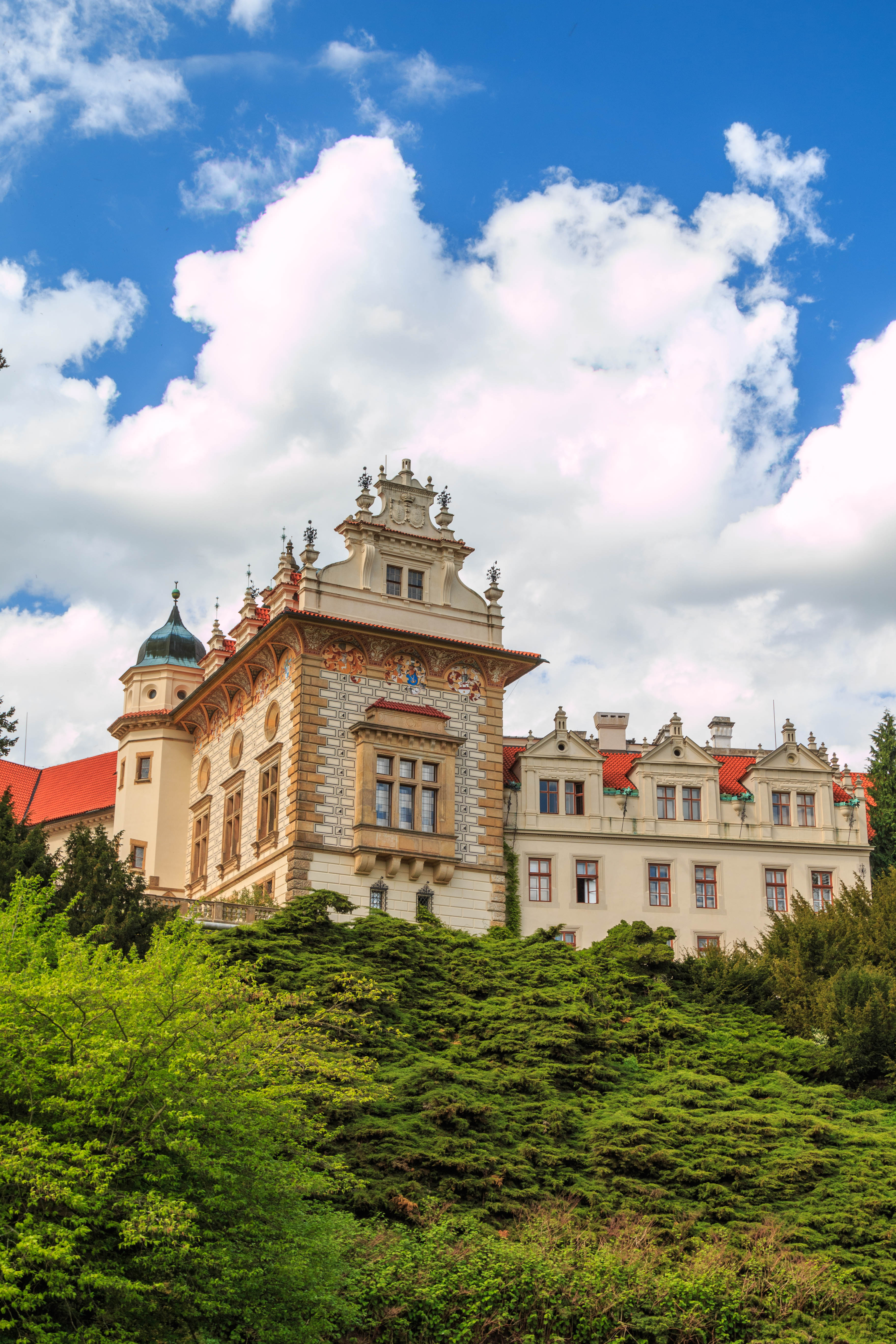 Zámek Průhonice, Průhonice, Osnice, Zdiměřice, Dobřejovice, Průhonice. Project: Chráněná území. Zámek Průhonice od Podámeckého rybníka